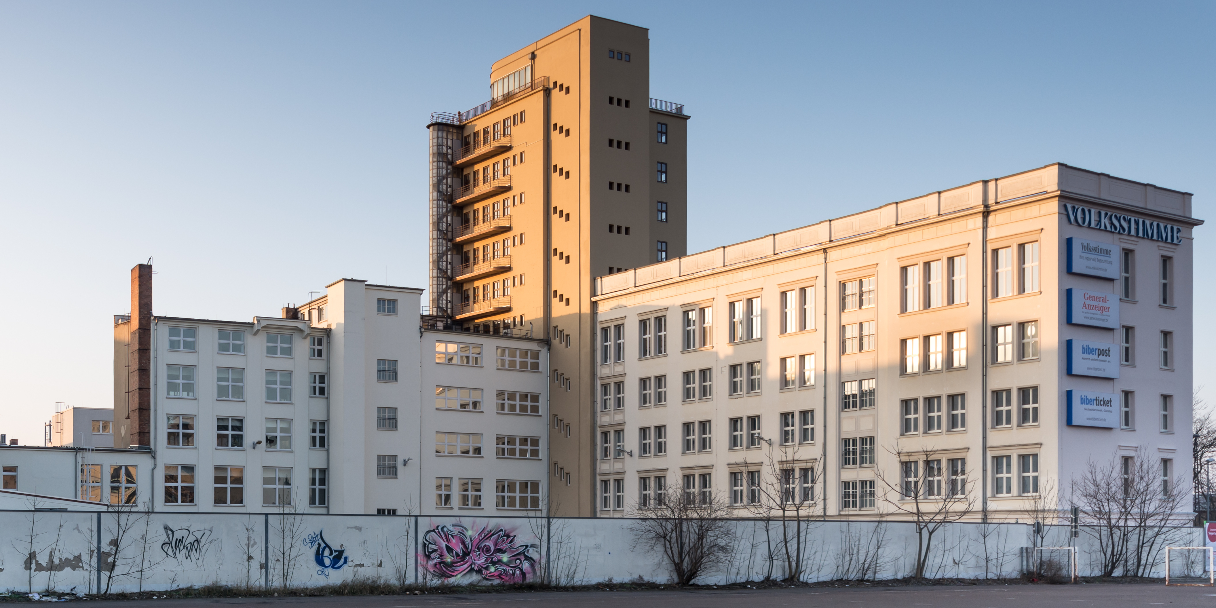 Faber-Hochhaus in Magdeburg-Altstadt. This is a photograph of an architectural monument.It is on the list of cultural monuments of Magdeburg